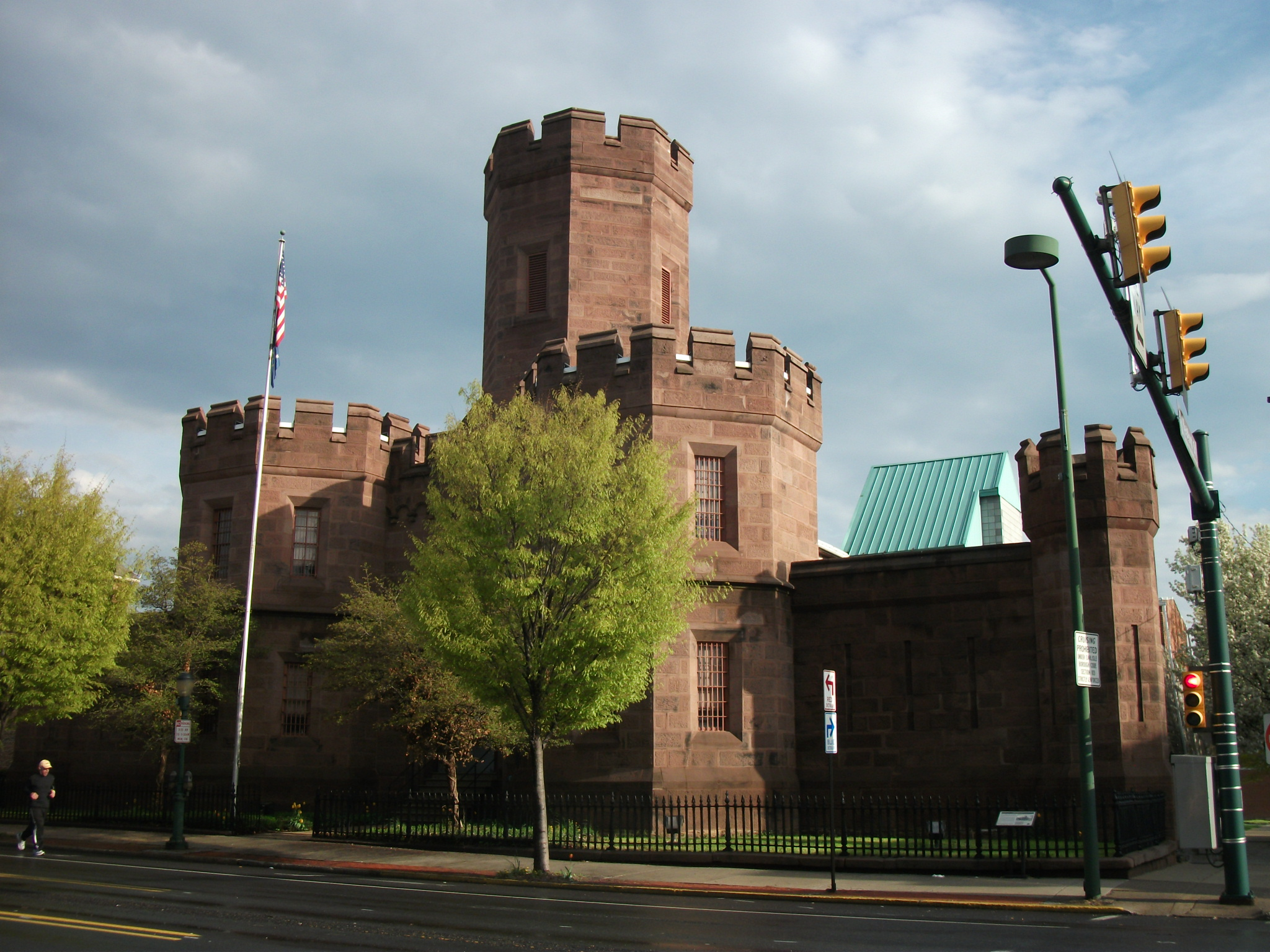 Carlisle, Pennsylvania